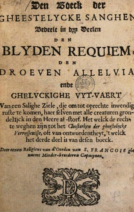 Frontispice van Den boeck der gheestelycke sanghen bedeelt in dry deelen Den blyden requiem, den droeven allelvia, ende ghelvckighe vyt-vaert, te Ghendt, By F. d'Erckel, inden Phoenix, 1674 (gedrukt te Gent, bij F. d'Erckel in 1674) Tekst van Eenen Religieus van d'Oorden van S. FRANCOIS ghenaemt Minder-broederen Capucynen (Lucas van Mechelen).